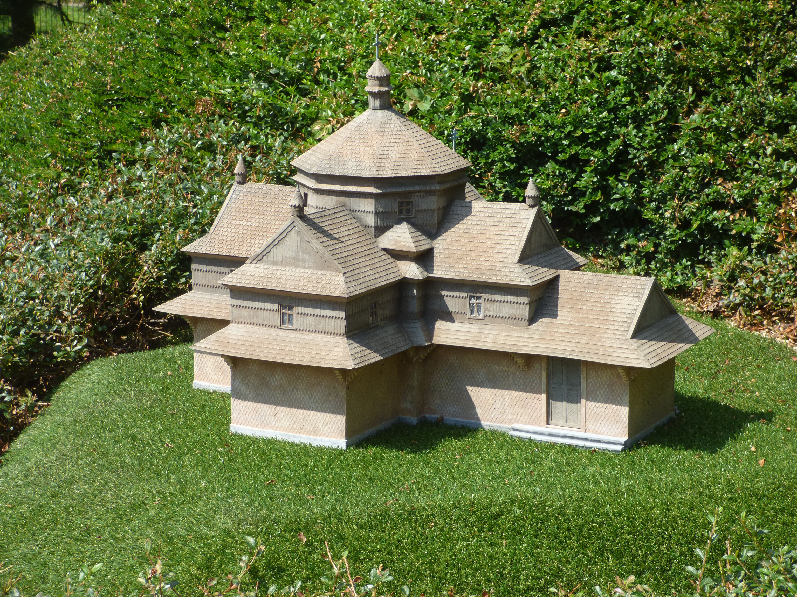 A körösmezői Felmagasztalás temploma makettje a szarvasi MIni Magyarország Makettparkban